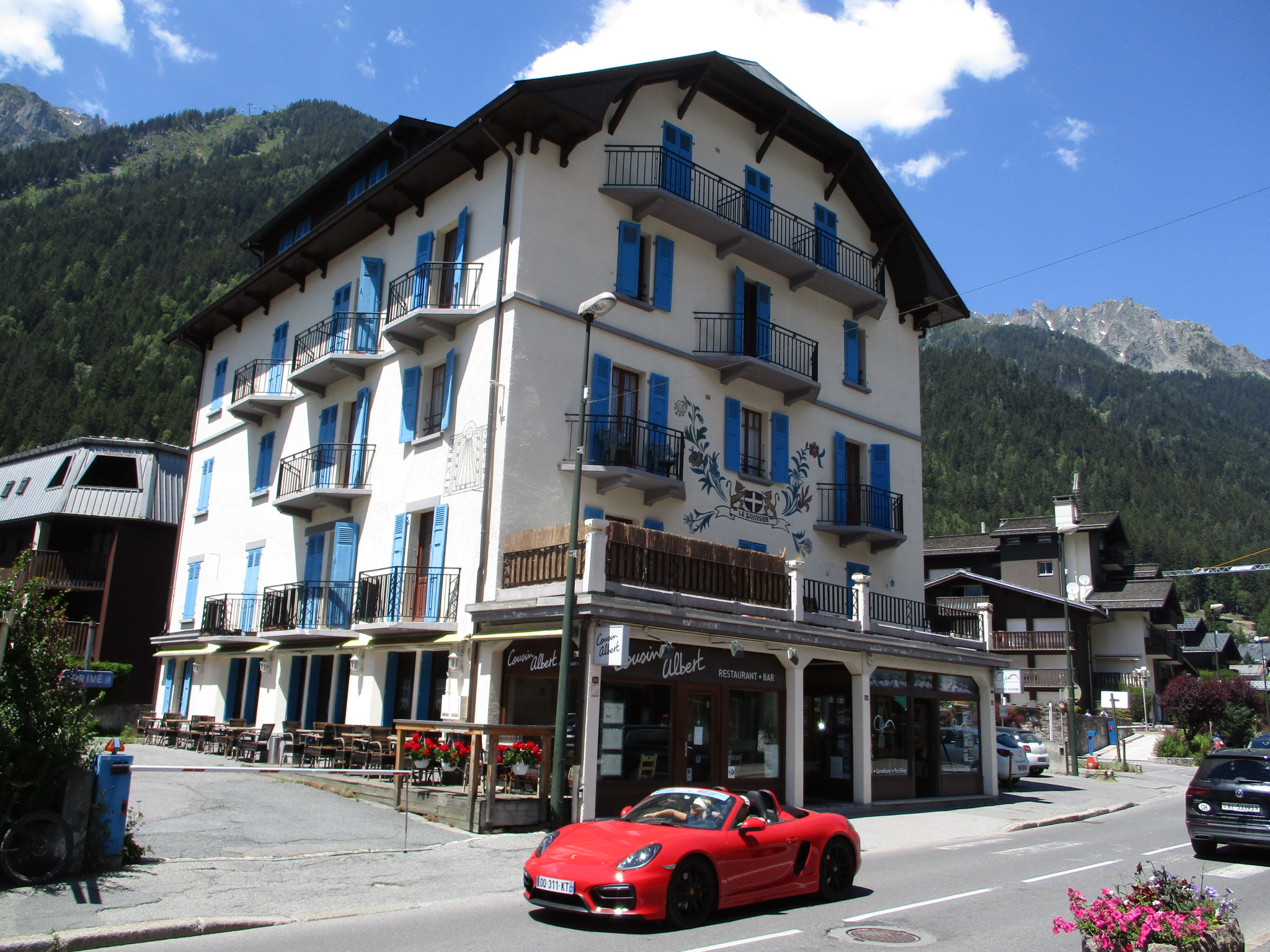 Streets in Chamonix